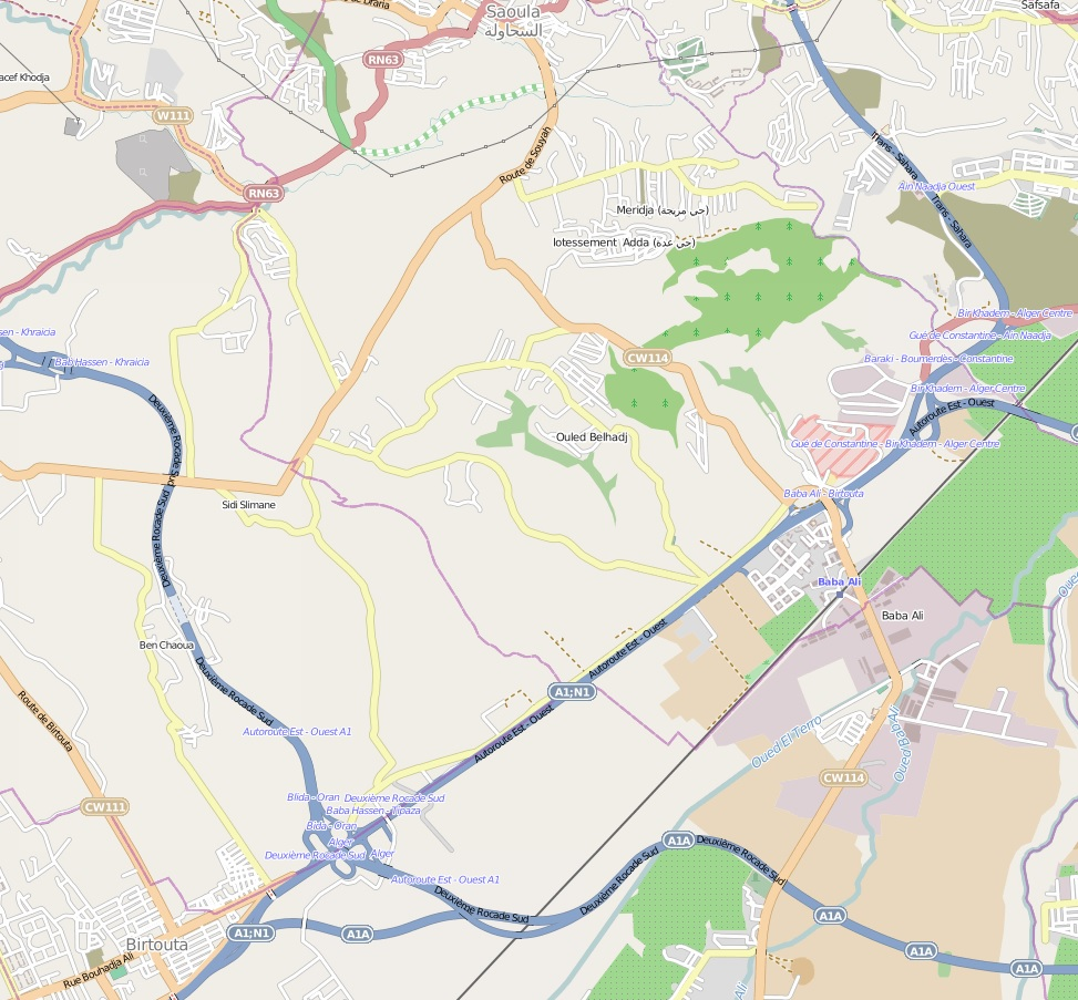 Situation de Baba Ali This map may be incomplete, and may contain errors. Don't rely solely on it for navigation.